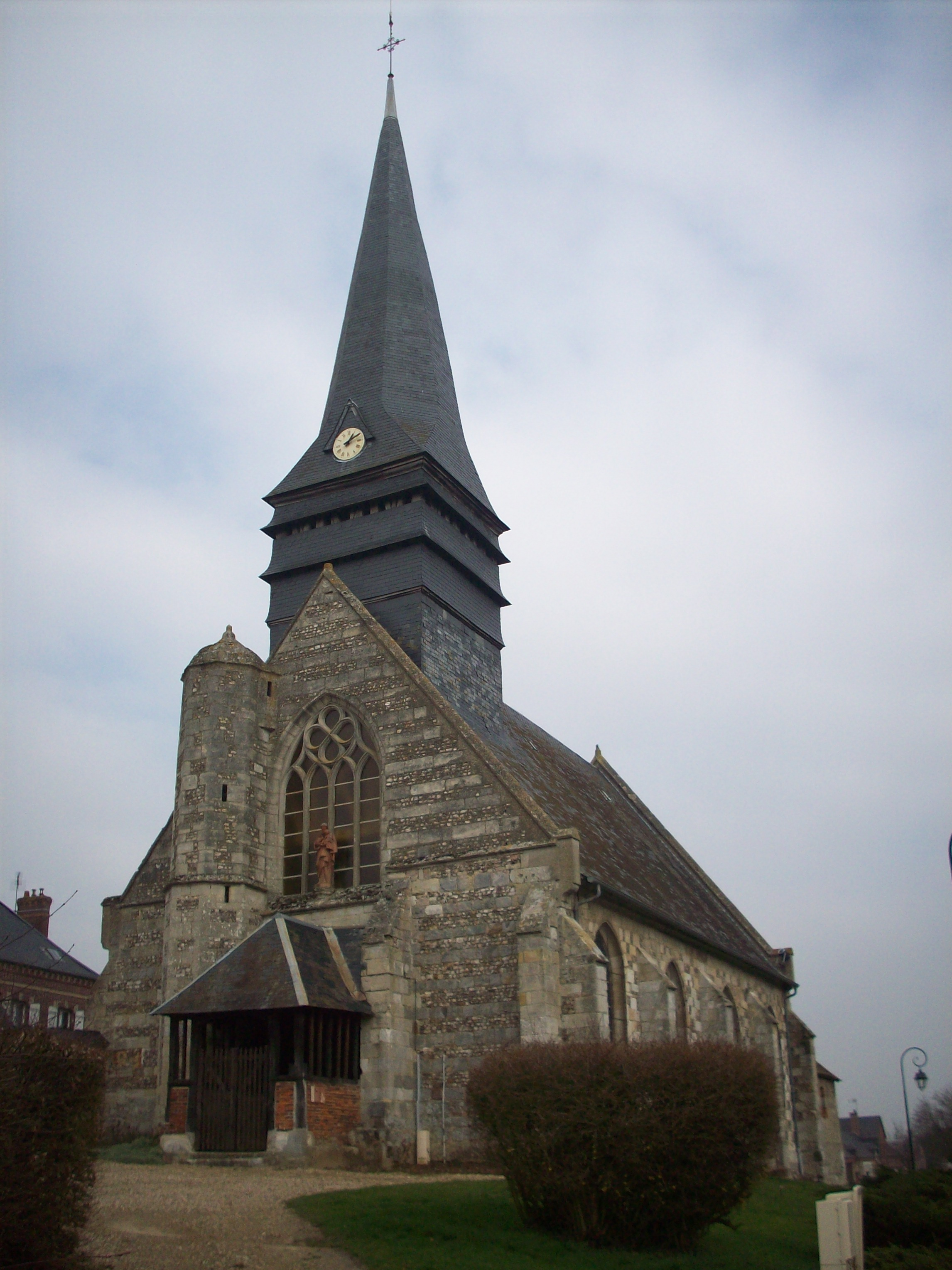 Eglise Saint-Lucien d'Hacqueville, du XIIe et XVIe siècle.